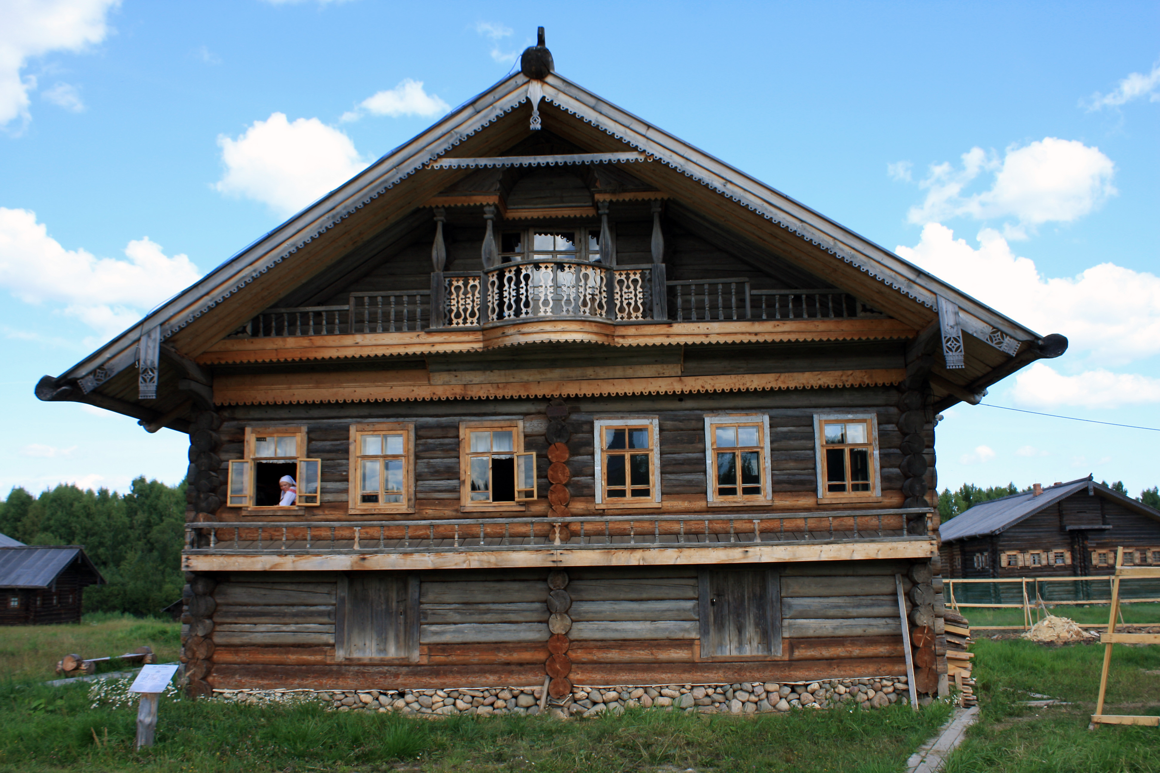 Архитектурно-этнографический музей (филиал Вологодского музея-заповедника) (Вологодская область, Вологда, д. Семенково)